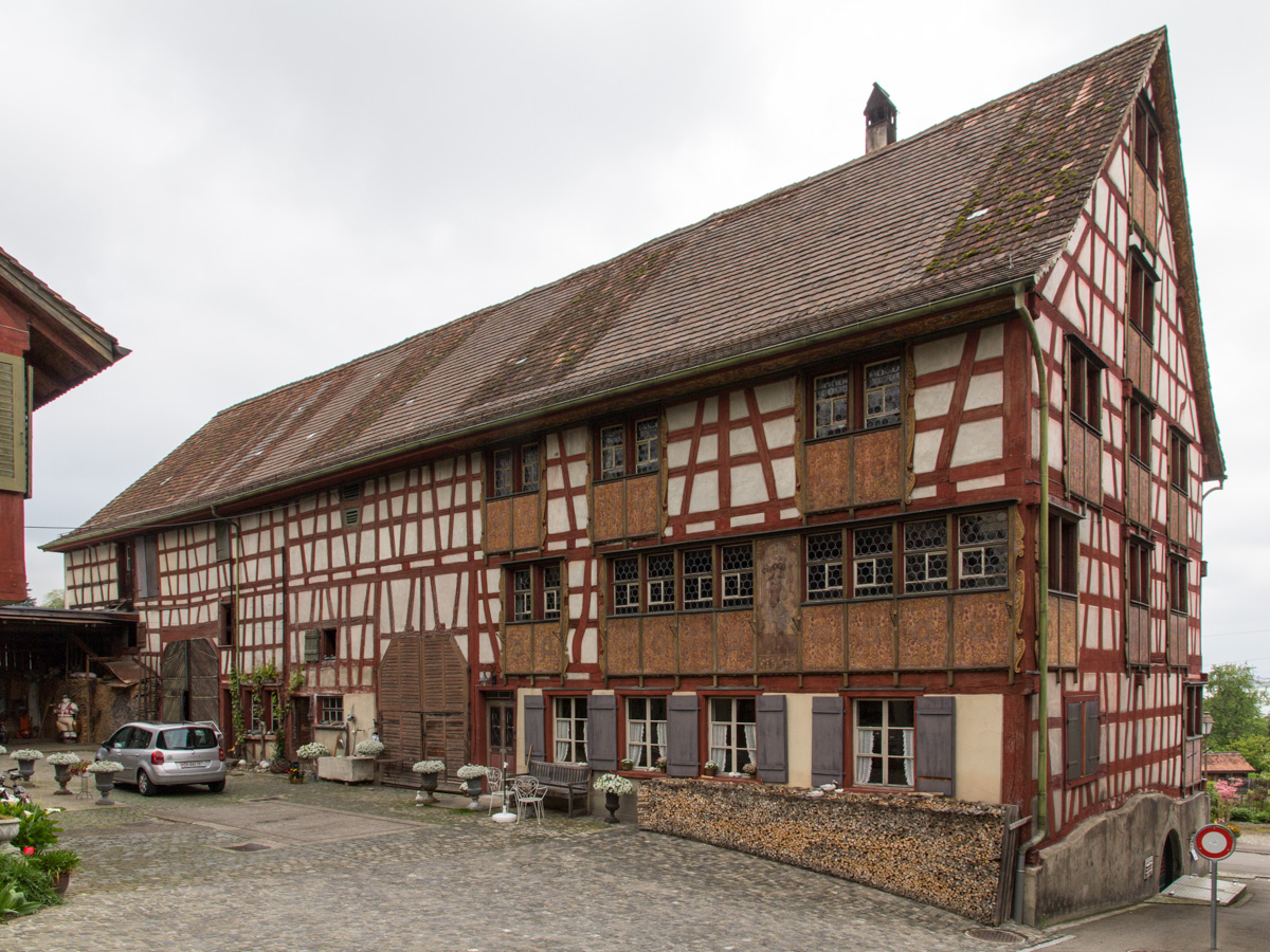 Kehlhof in Ermatingen TG (Ansicht von Süd-Osten)